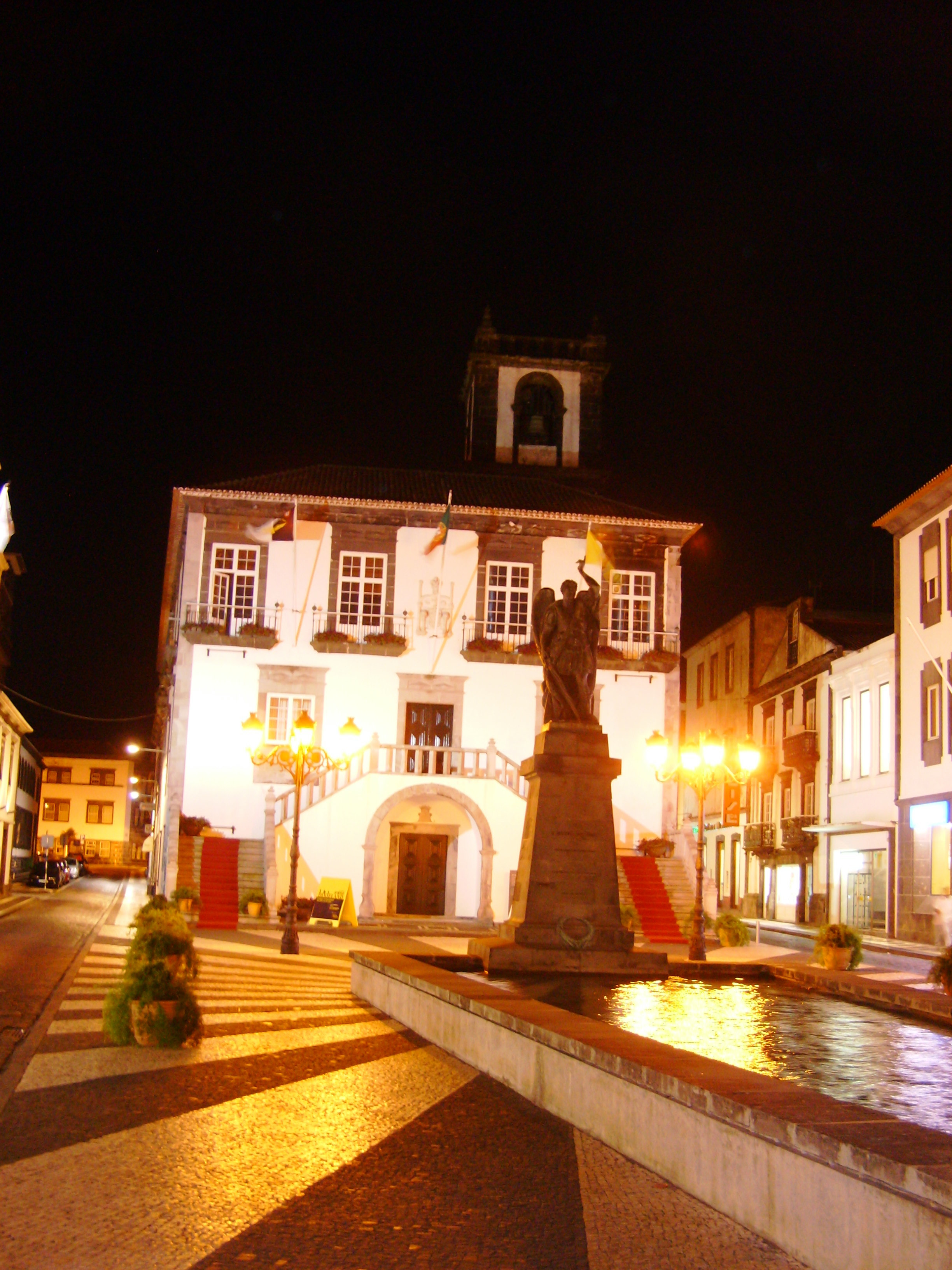 Edifício da Câmara Municipal, cidade e concelho de Ponta Delgada, ilha de São Miguel, Açores: vista noturna.